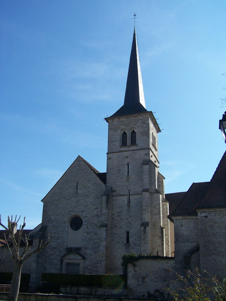 GILLY LES CITEAUX